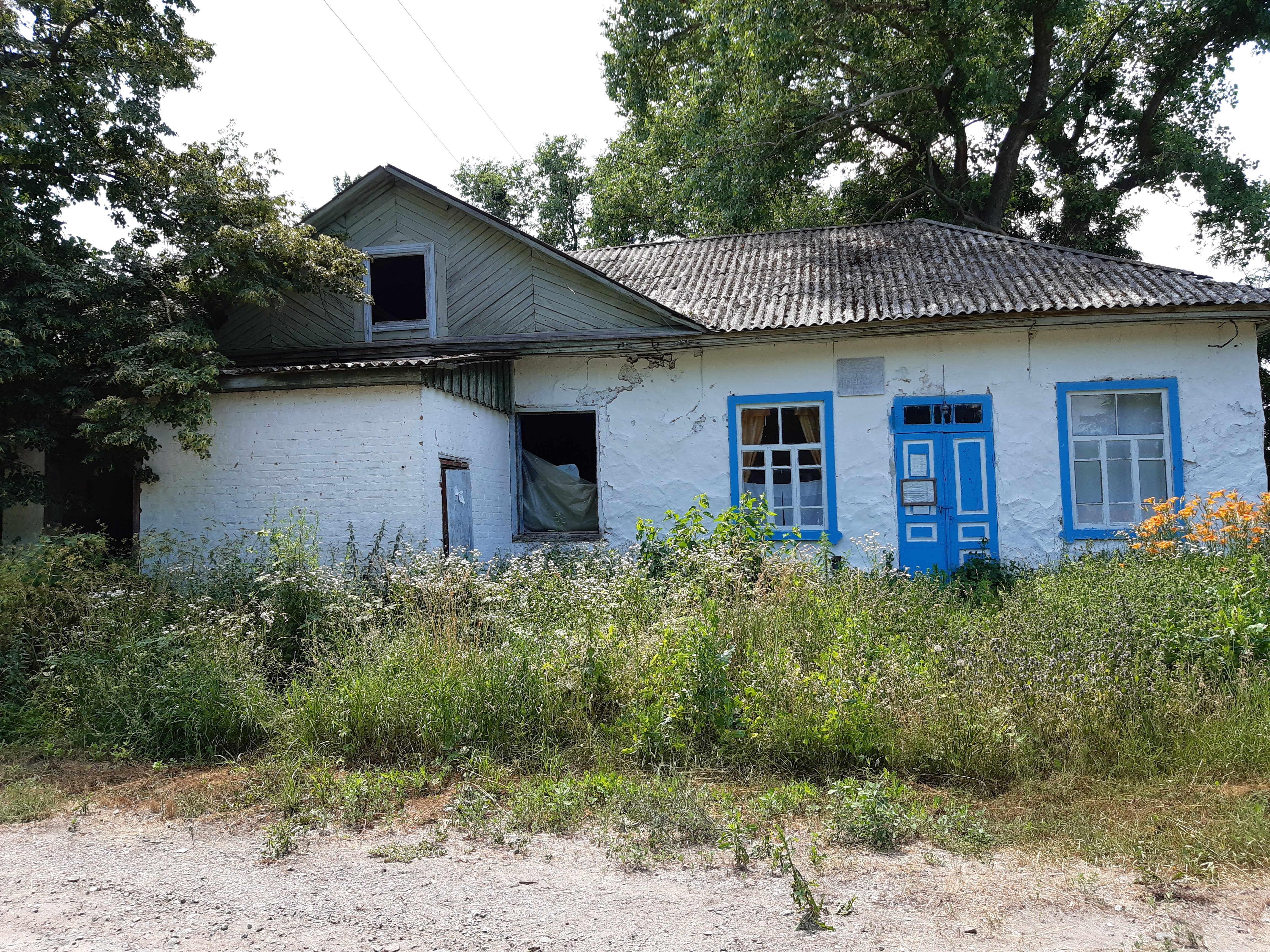 Адміністративне приміщення в с. Маціївці, Прилуцький район, Чернігівська область. Червень 2019